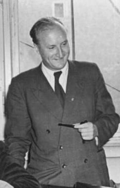 Leipzig, Universität, Institu für Politische Ökonomie Zentralbild Lücke 26.9.1953 Kno-Wi.Prof. Dr. Friedrich Behrens Institut für Politische Ökonomie der Karl-Marx-Universität Leipzig im Gespräch mit Studenten. Abgebildete Personen: Behrens, Friedrich Prof. Dr.: Wirtschaftswissenschaftler, Akademie der Wissenschaften (AdW) Berlin, DDR (GND 122072006)